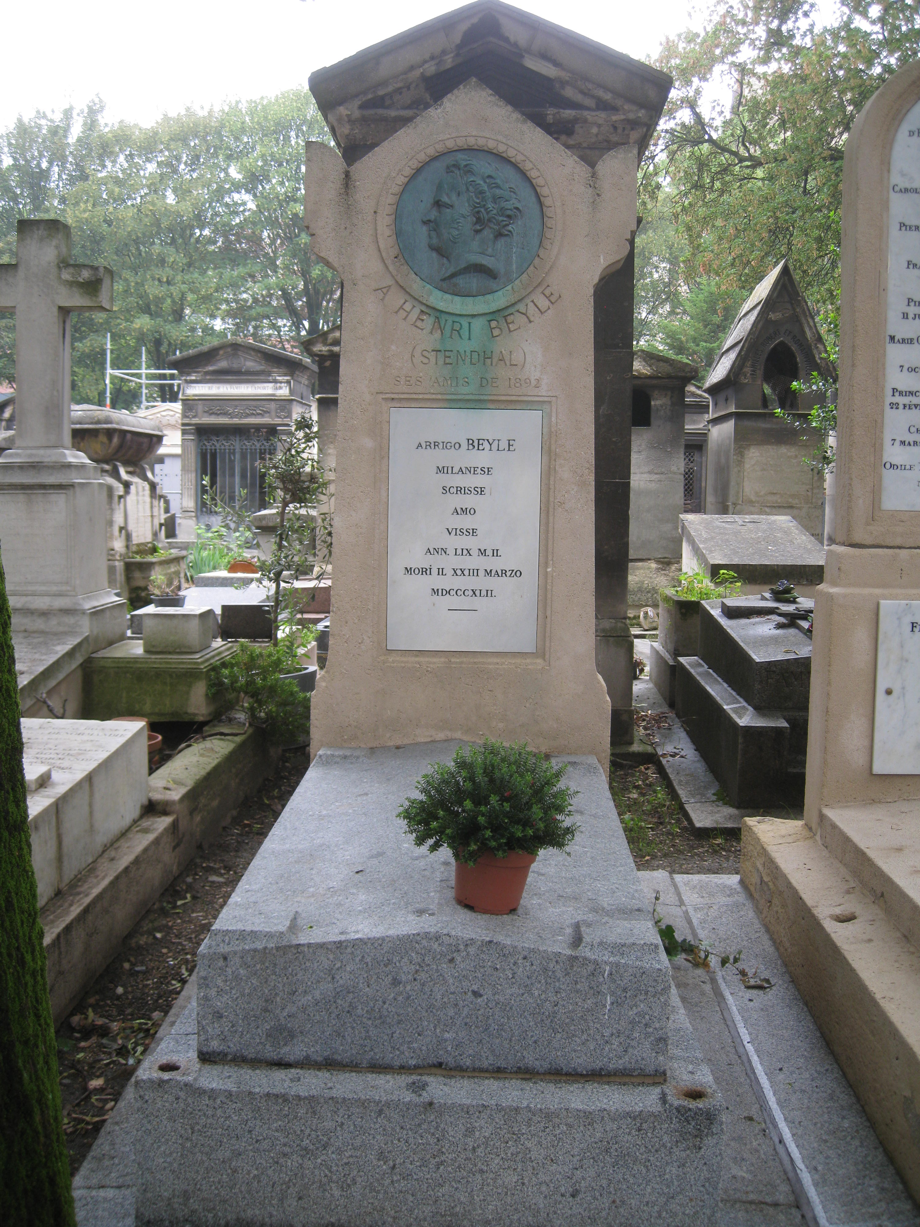 スタンダールの墓